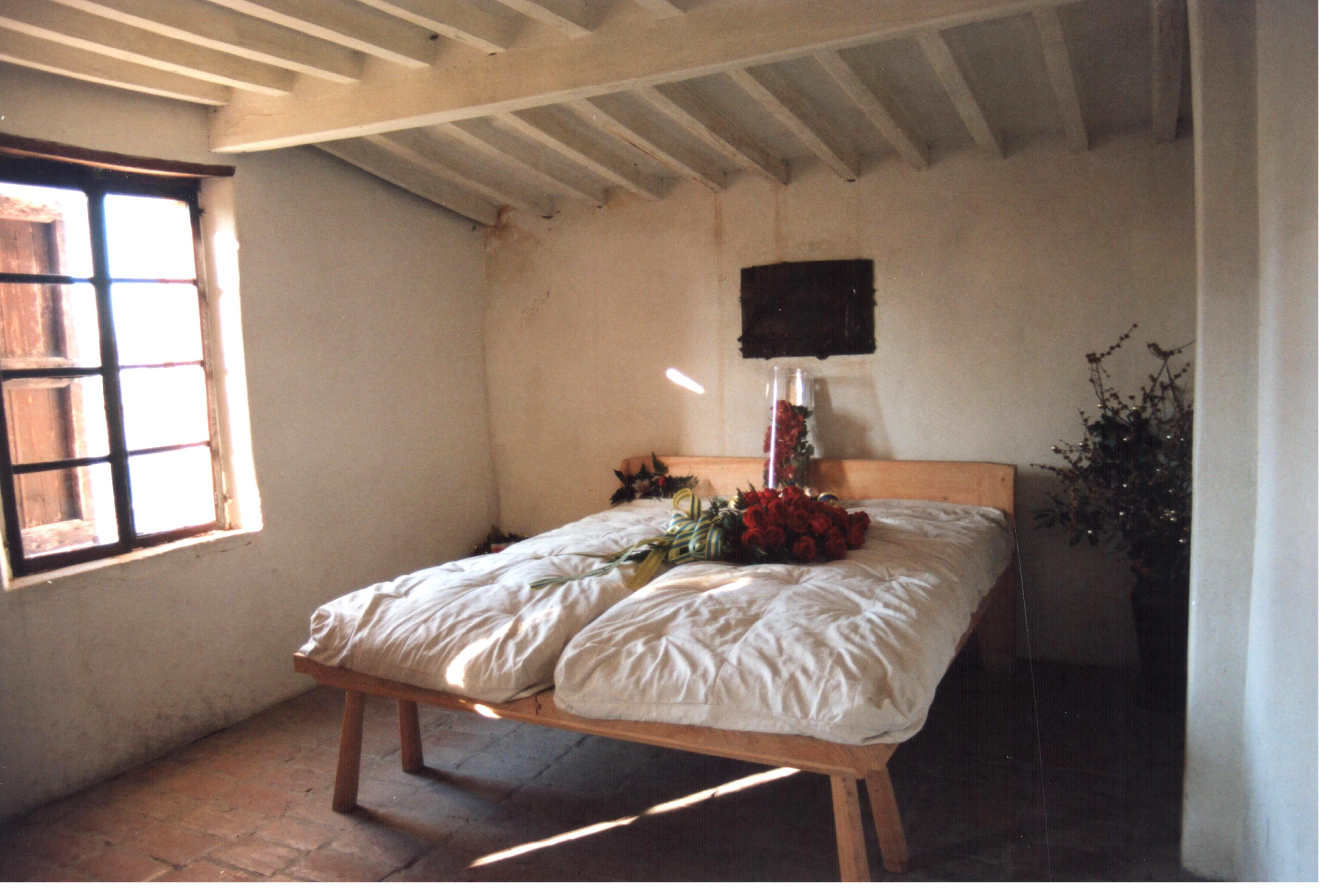 Casa natale di G. Verdi camera da letto This is a photo of a monument which is part of cultural heritage of Italy.